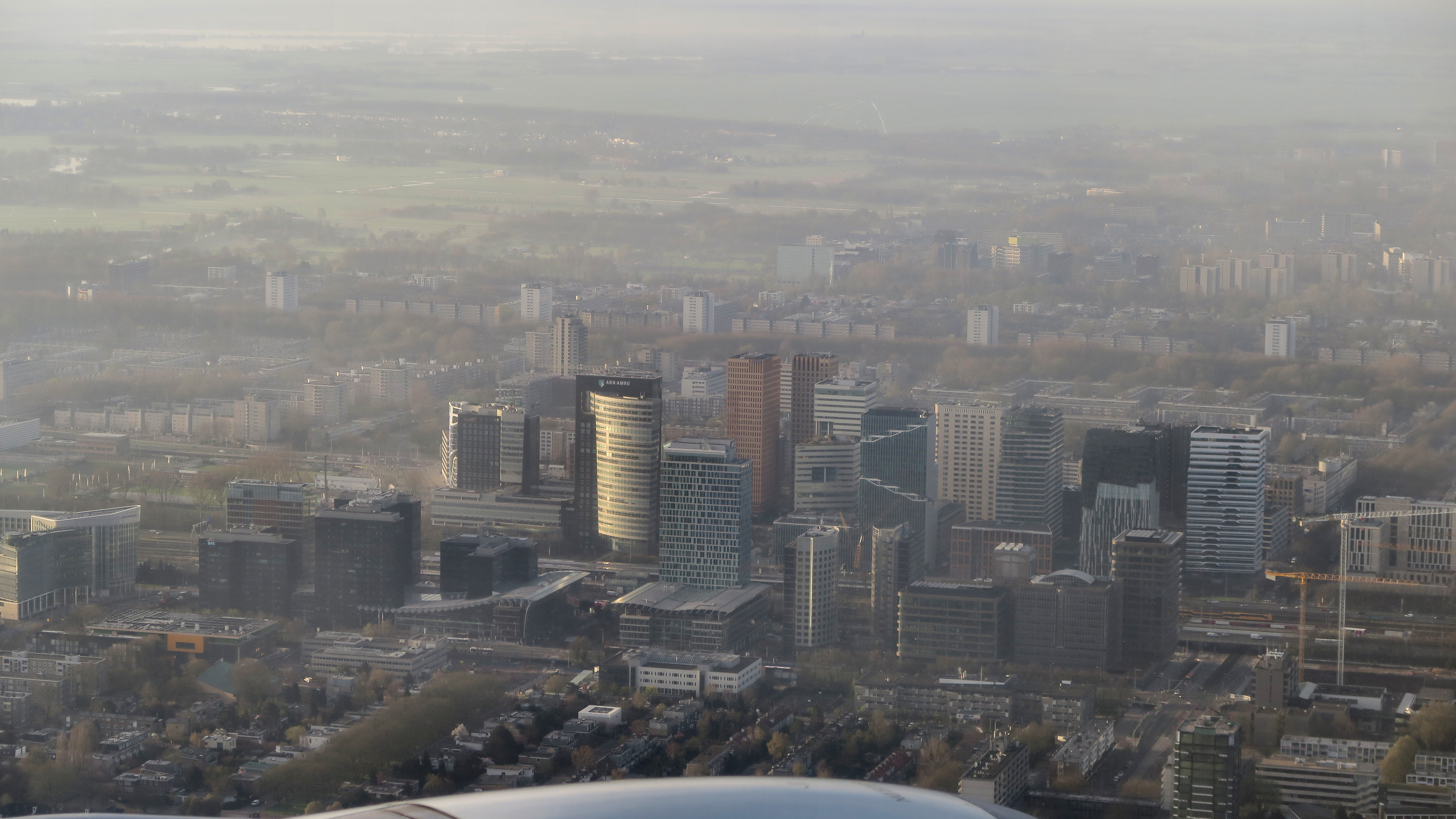 De Zuidas gezien naar het zuiden, april 2018; in het midden het hoofdkantoor van ABN Amro